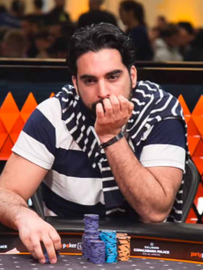 Alexandros Kolonias bei den partypoker Millions South America